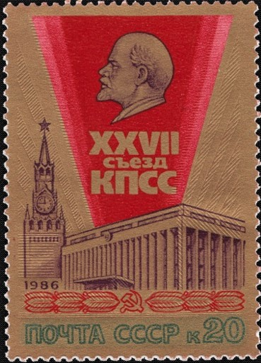 Почтовая марка СССР. Кремлёвский дворец съездов. Номер в каталоге ЦФА 5691